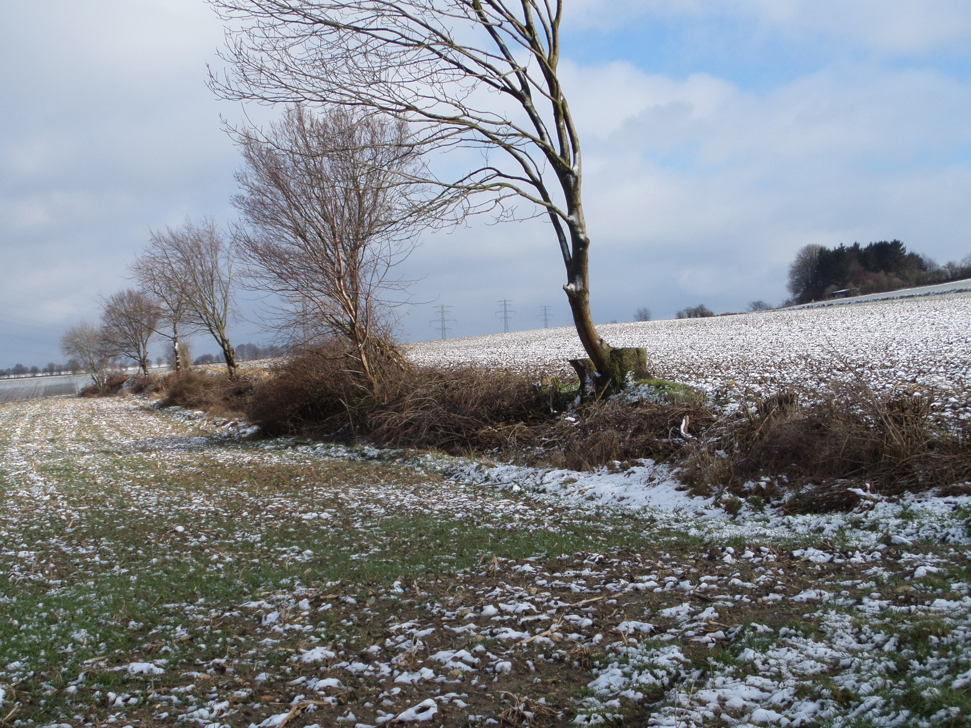 Graft op de helling van de Schaapsdries bij Ransdaal (gemeente Voerendaal) in de Nederlandse provincie Limburg.